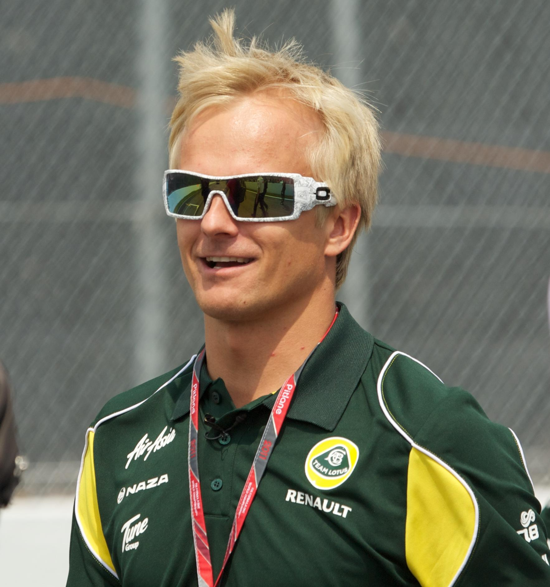 Heikki Kovalainen